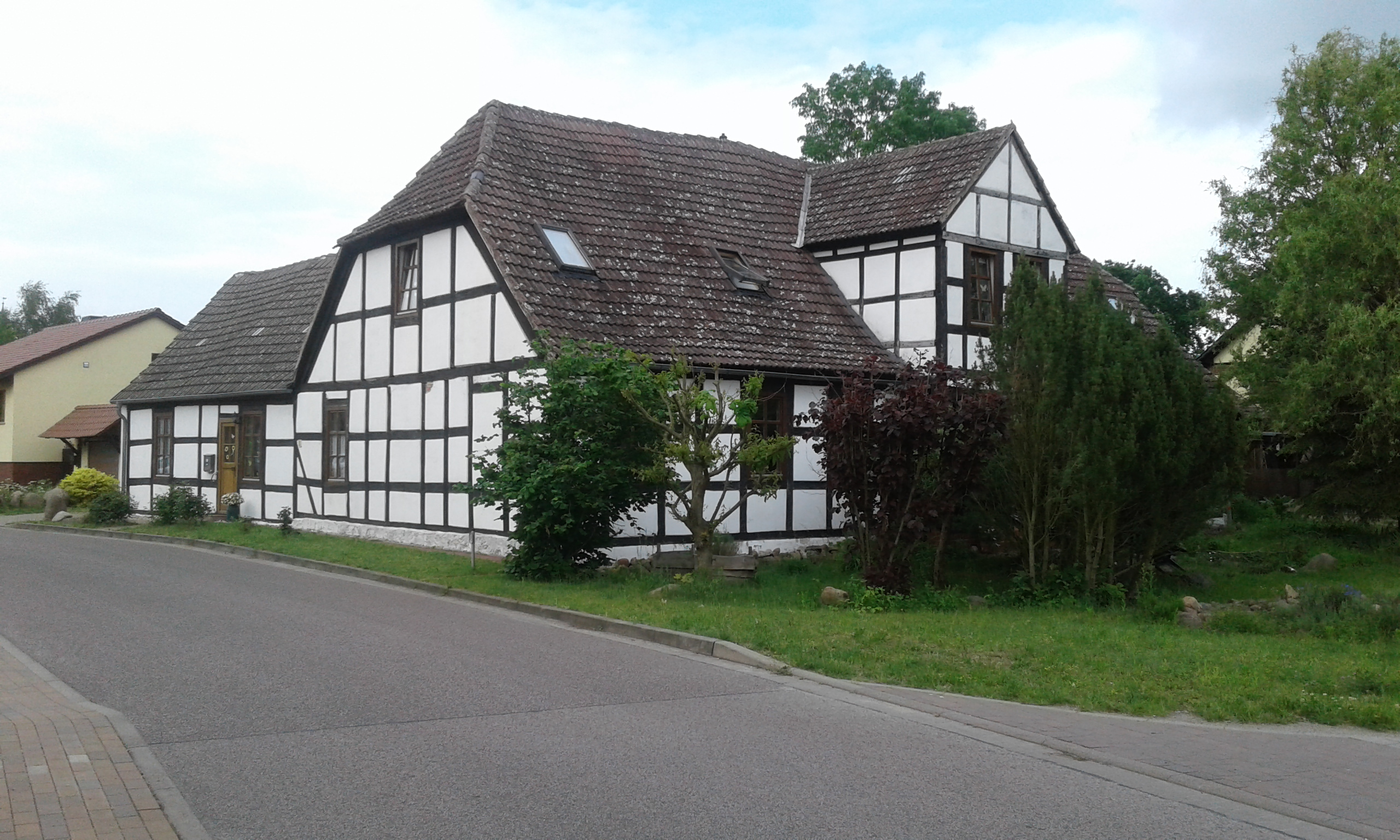 Gutshof